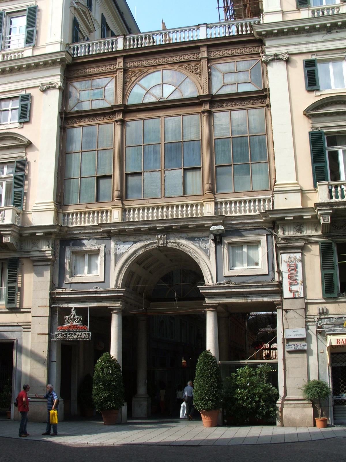 La Galleria Mazzini di Genova. Ingresso alla Galleria Mazzini (da Piazza Corvetto)